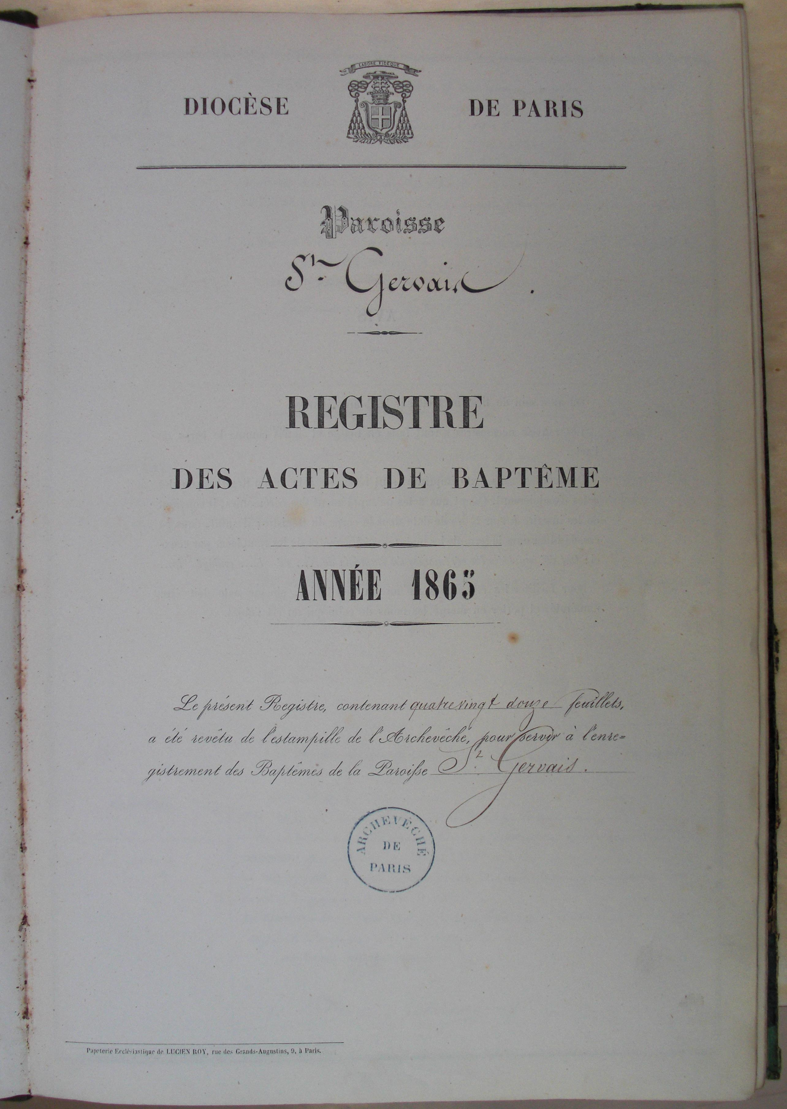 Photo de la première page du registre des baptêmes de 1865 de l'église Saint-Gervais de Paris, Archives diocésaines de Paris